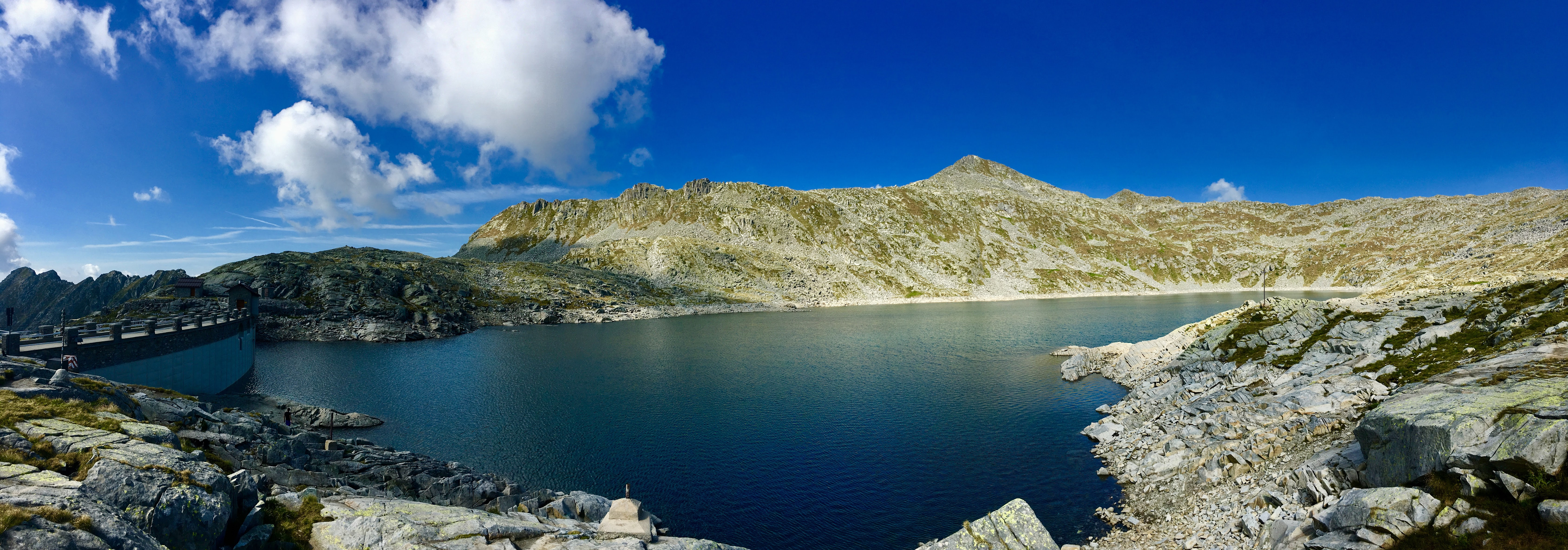 Parco Naturale Adamello (Q47780554)